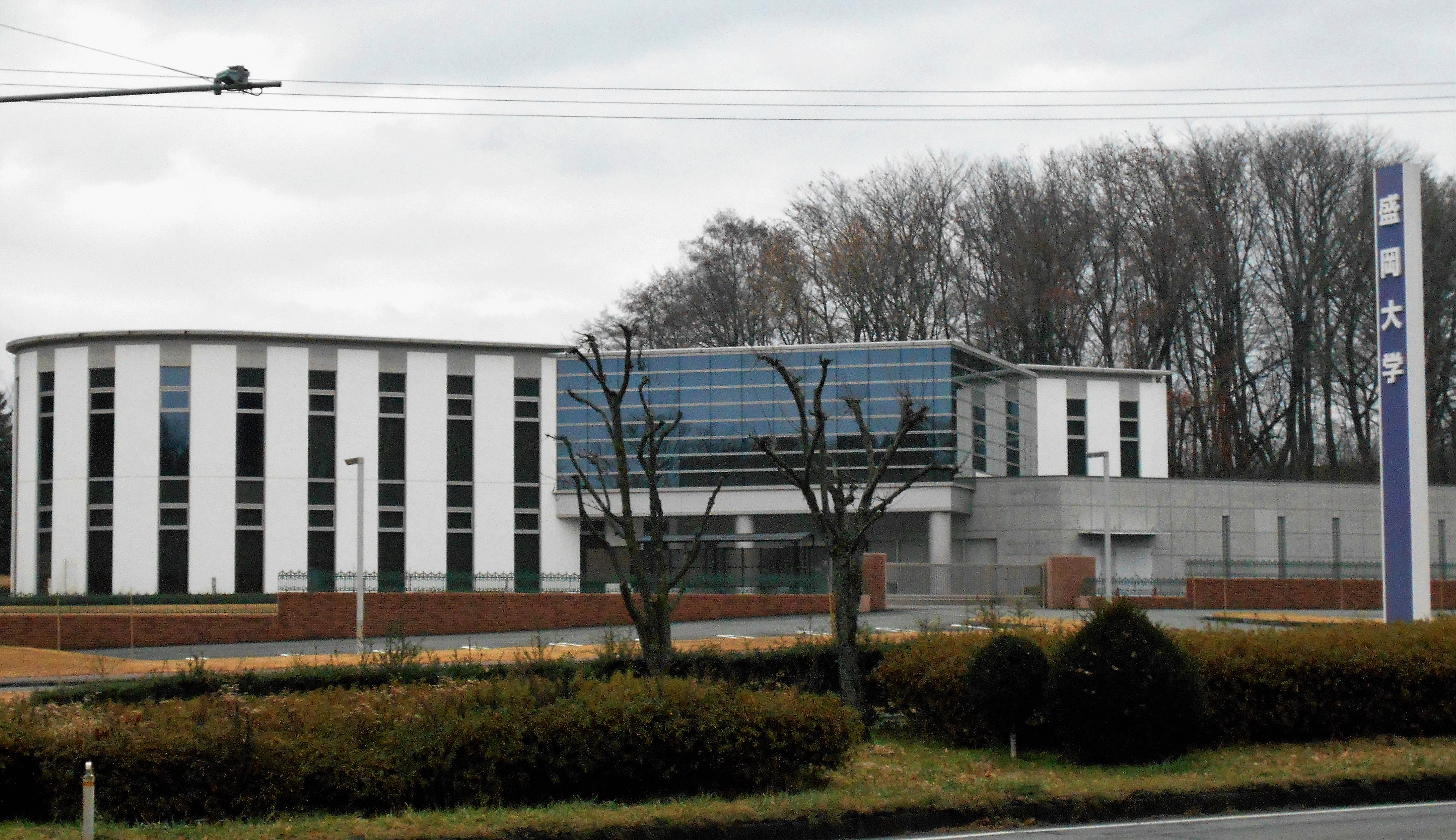 盛岡大学図書館（岩手県滝沢市、2016年11月）